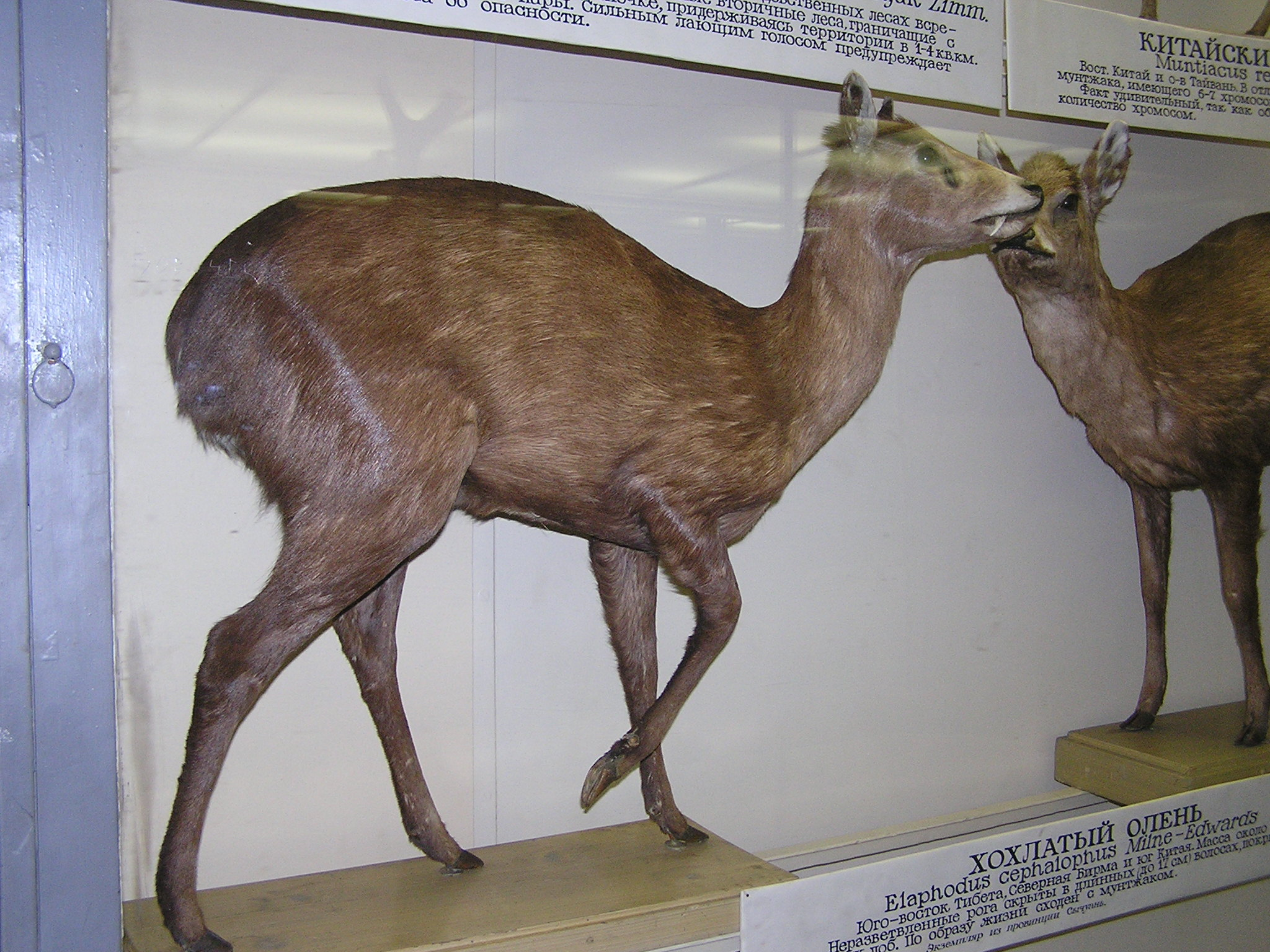 Зоологический музей в Санкт-Петербурге. Хохлатый олень